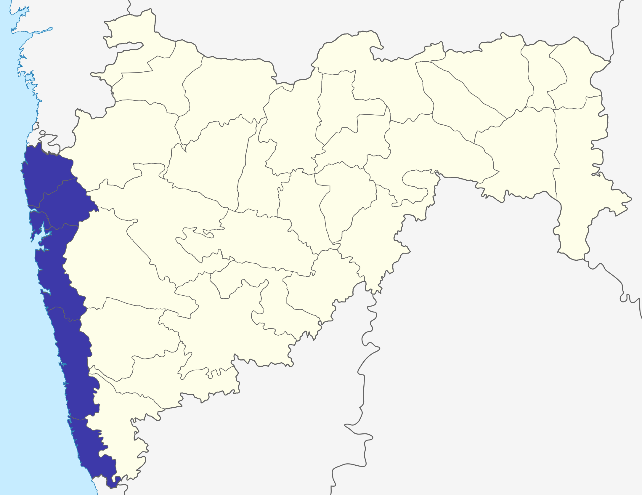 Konkan division in Maharashtra, India